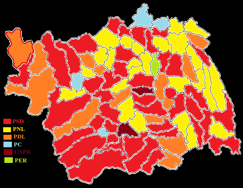 Harta politica a județului Bacau. Cu Primari fiecărei comune .